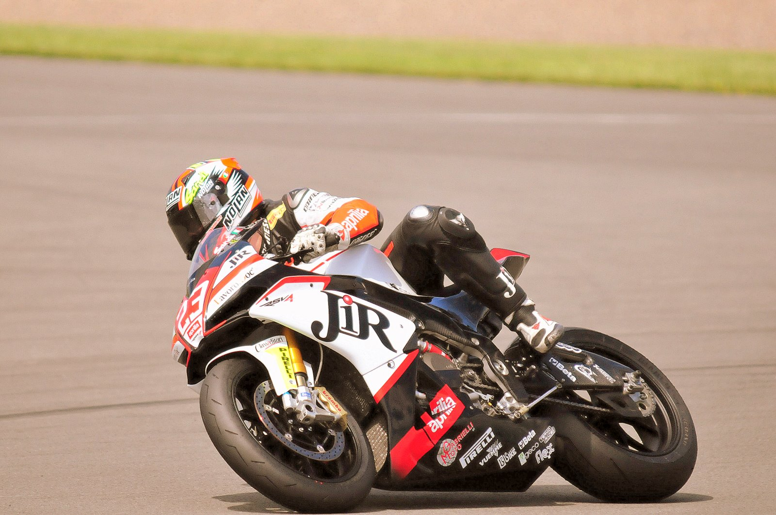 Federico Sandi in sella all'Aprilia RSV4